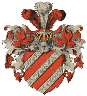 Brunnowi suguvõsa parunivapp